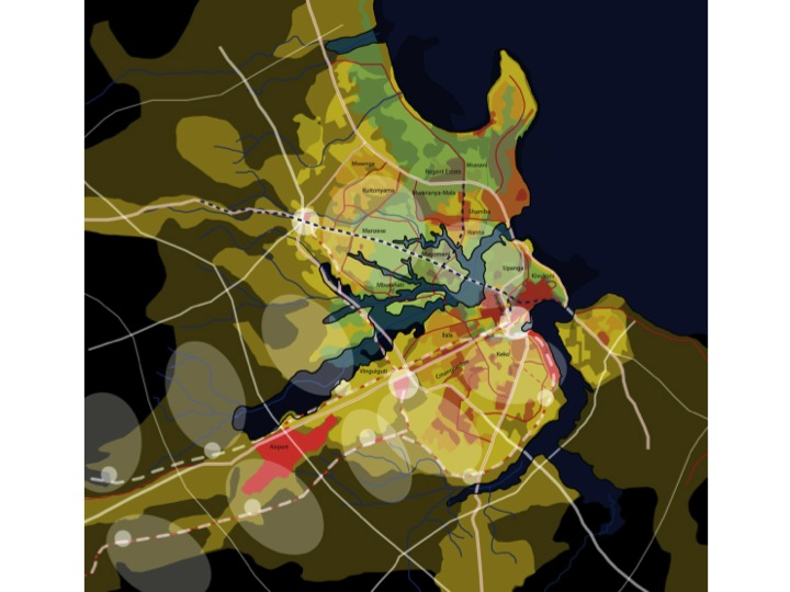 Dar es Salaam reticula